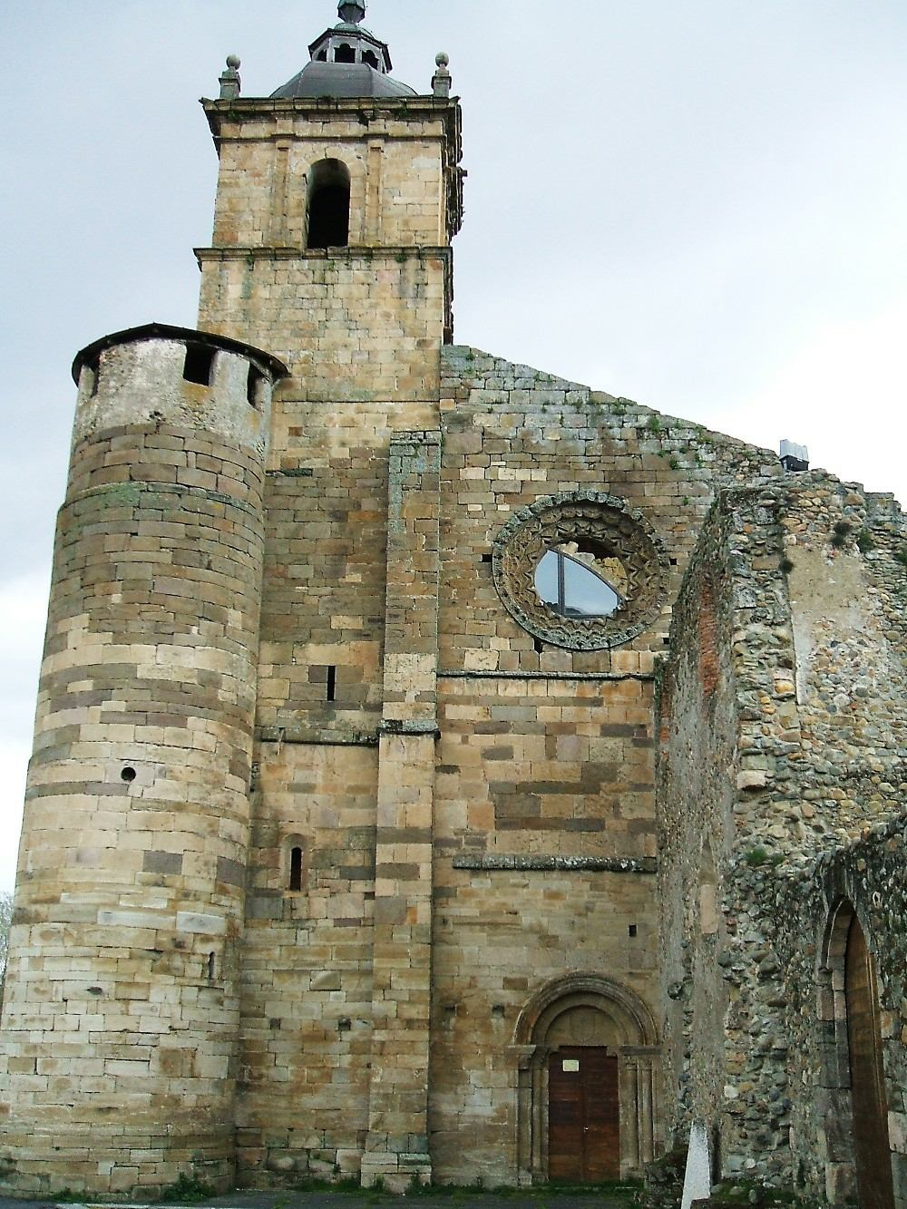 Monasterio de Santa María de Carracedo, en Carracedo del Monasterio, León, España